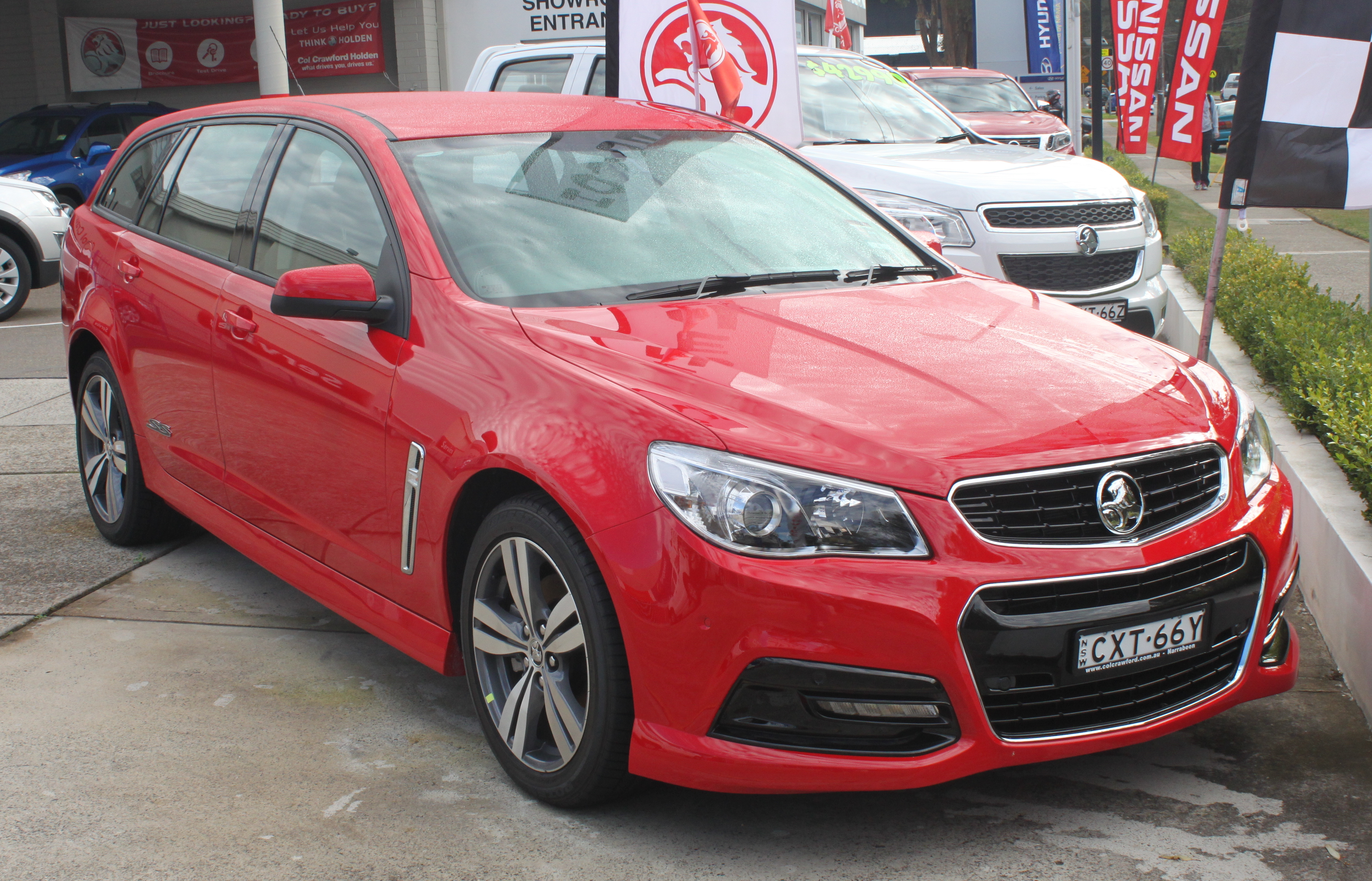 Holden Commodore VF SS Wagon